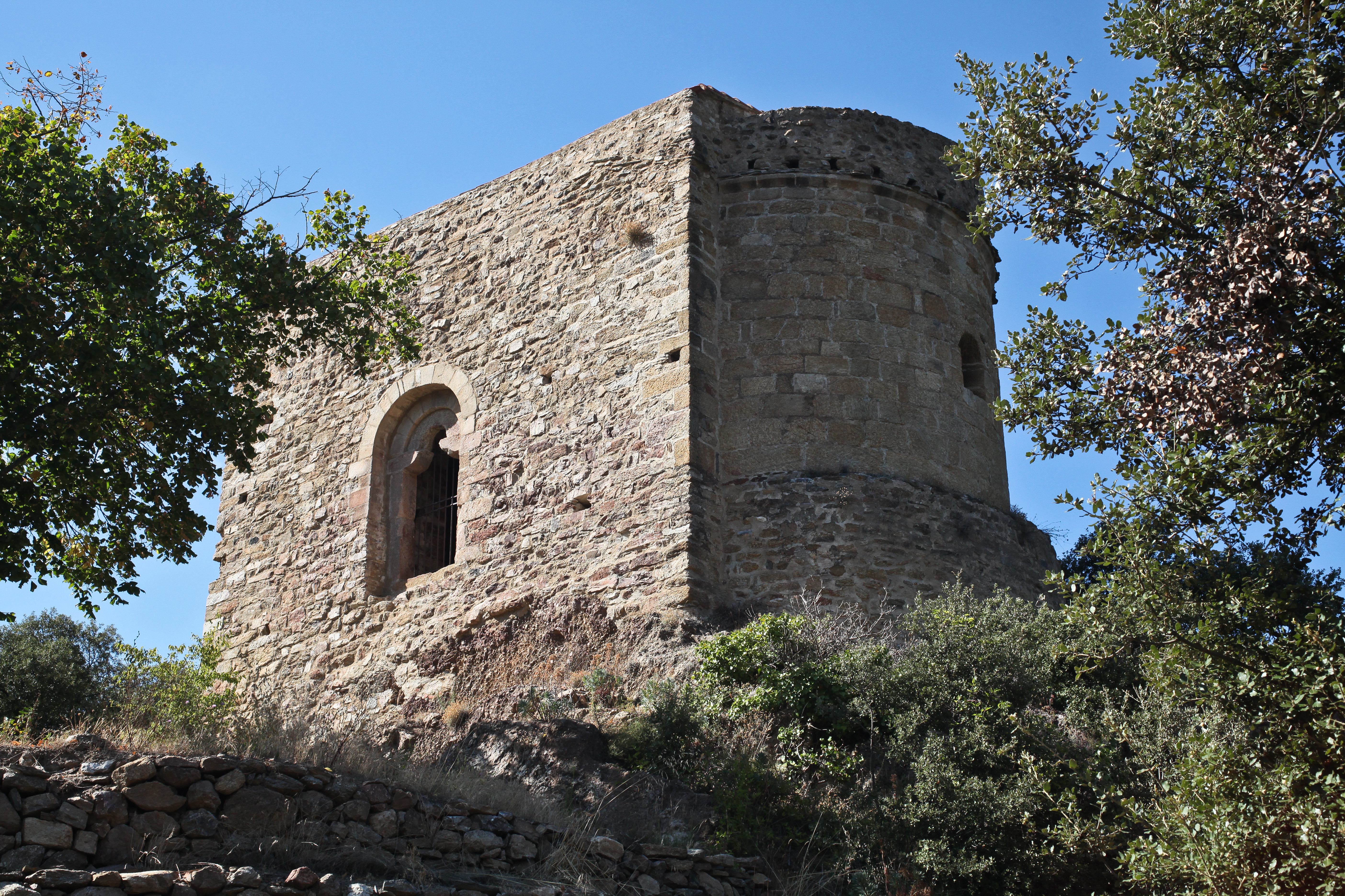 Église Saint-Valentin de Corts (dite aussi Tour de Corts) (Inscrit) .